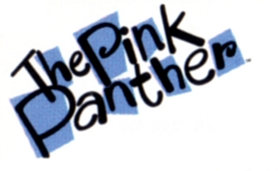 US Logo der Serie Pink Panther (Der rosarote Panther)